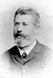 Wenzel Wenhart (1834 - 1912), Rakouský pedagog a básník narozen na Šumavě.